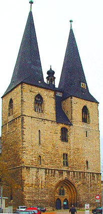 Urheber: Dieter Steinmetz]